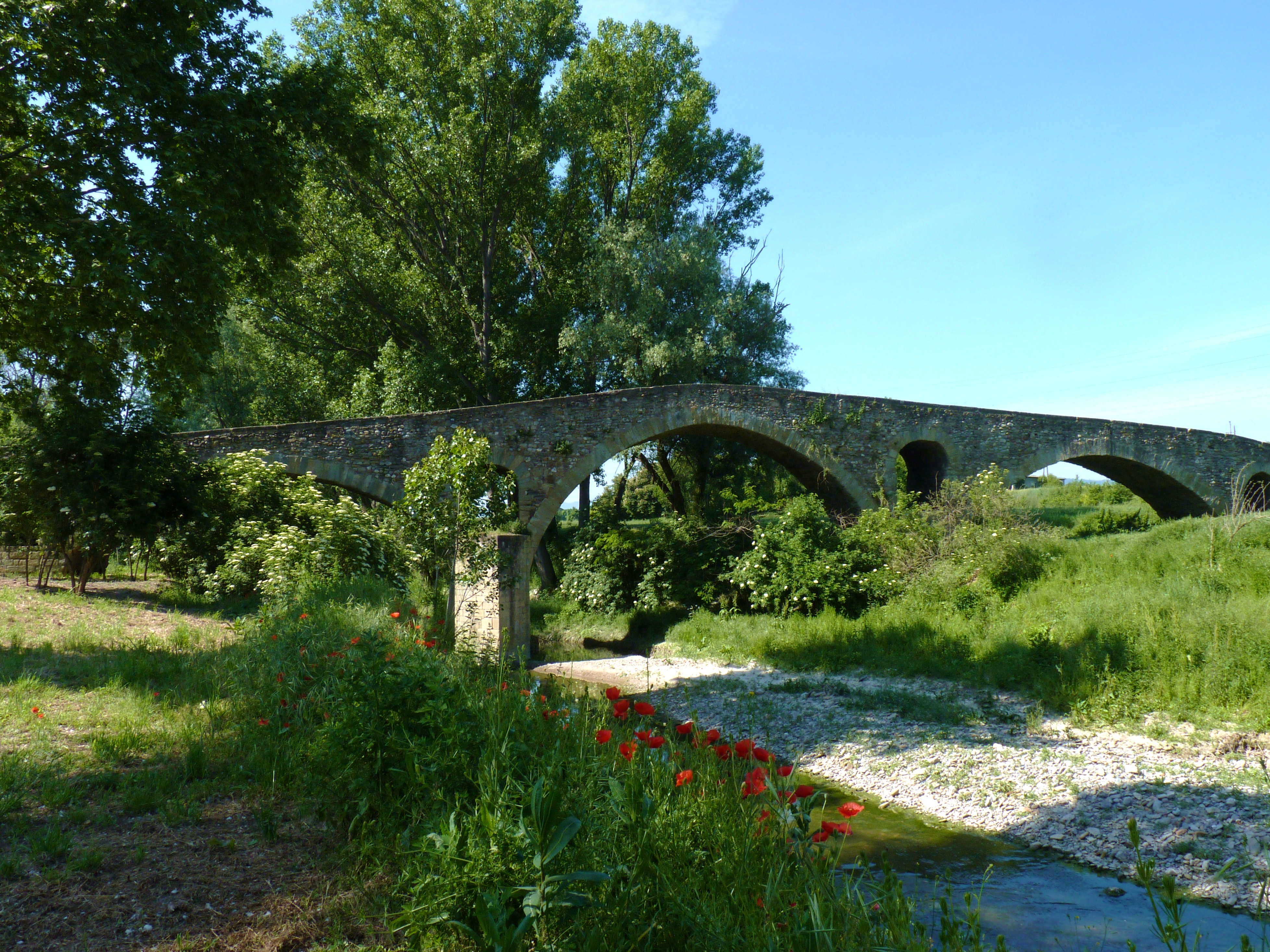 El Pont d'en Bruguer (Vic)